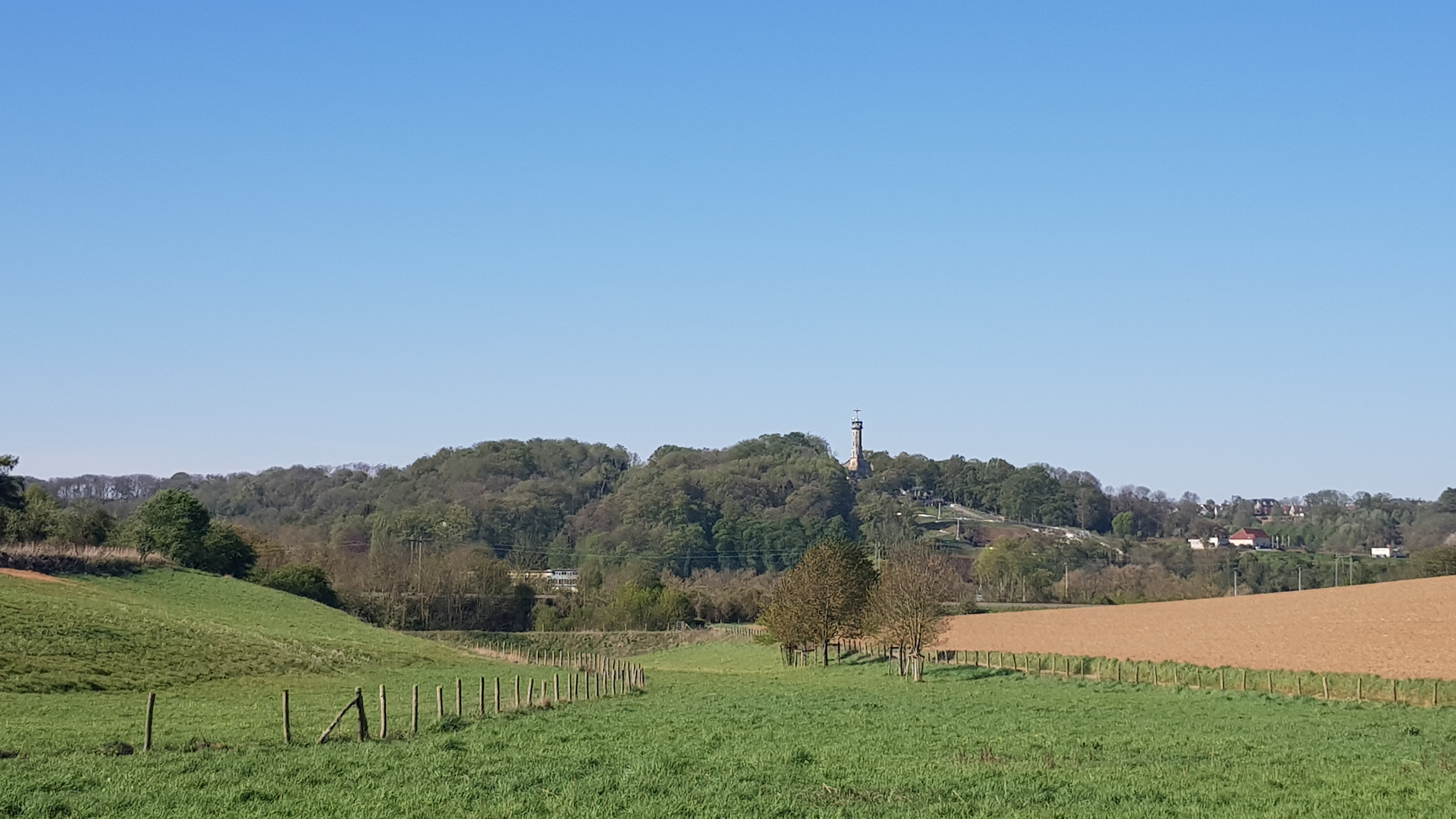 Heunsberg gezien vanaf de overzijde van het Geuldal, Valkenburg aan de Geul, Nederland